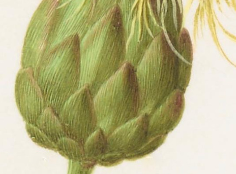 Rhaponticoides africana, como Centaurium majus luteum. - Detalle de las brácteas involucrales.